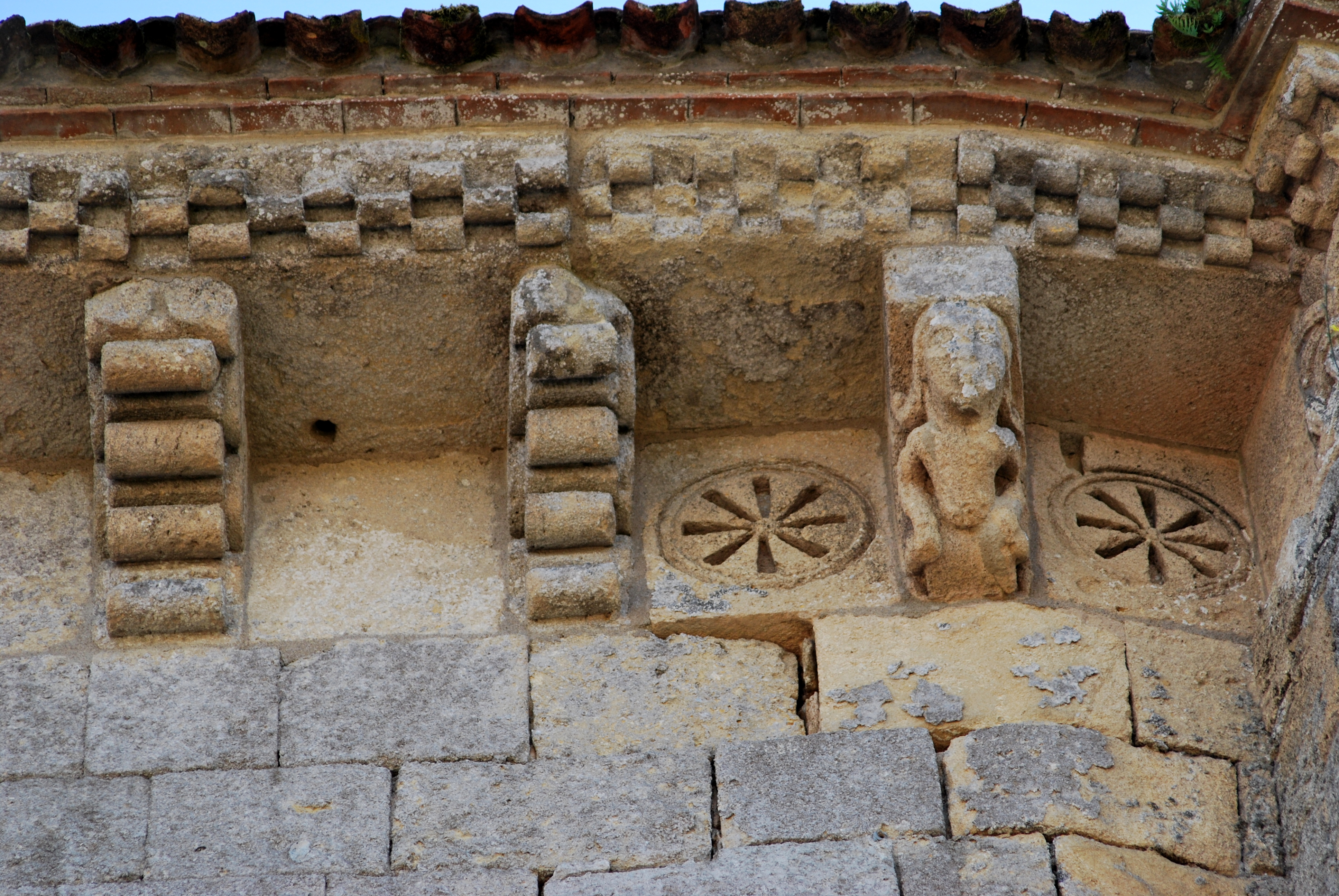 Saint-Macaire église Saint-Sauveur